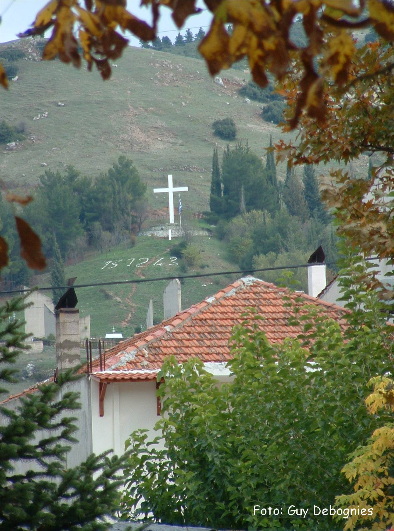 November 2005